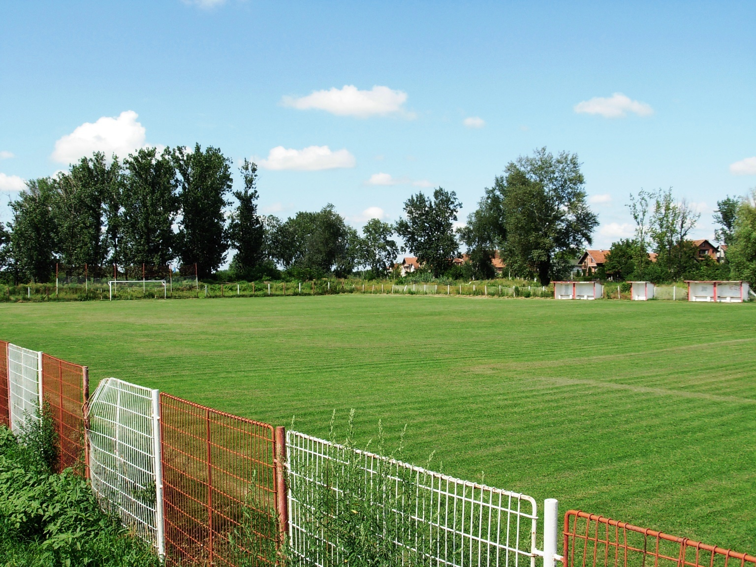 Stadion FK Crvena Zvezda Novi Sad. Naselje Mali Beograd.